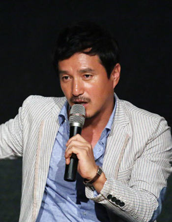 성우 되는 방법 궁금해 메르시 성우 이현진처럼 너도 성우가 될 수 있어! 성우과 조재현